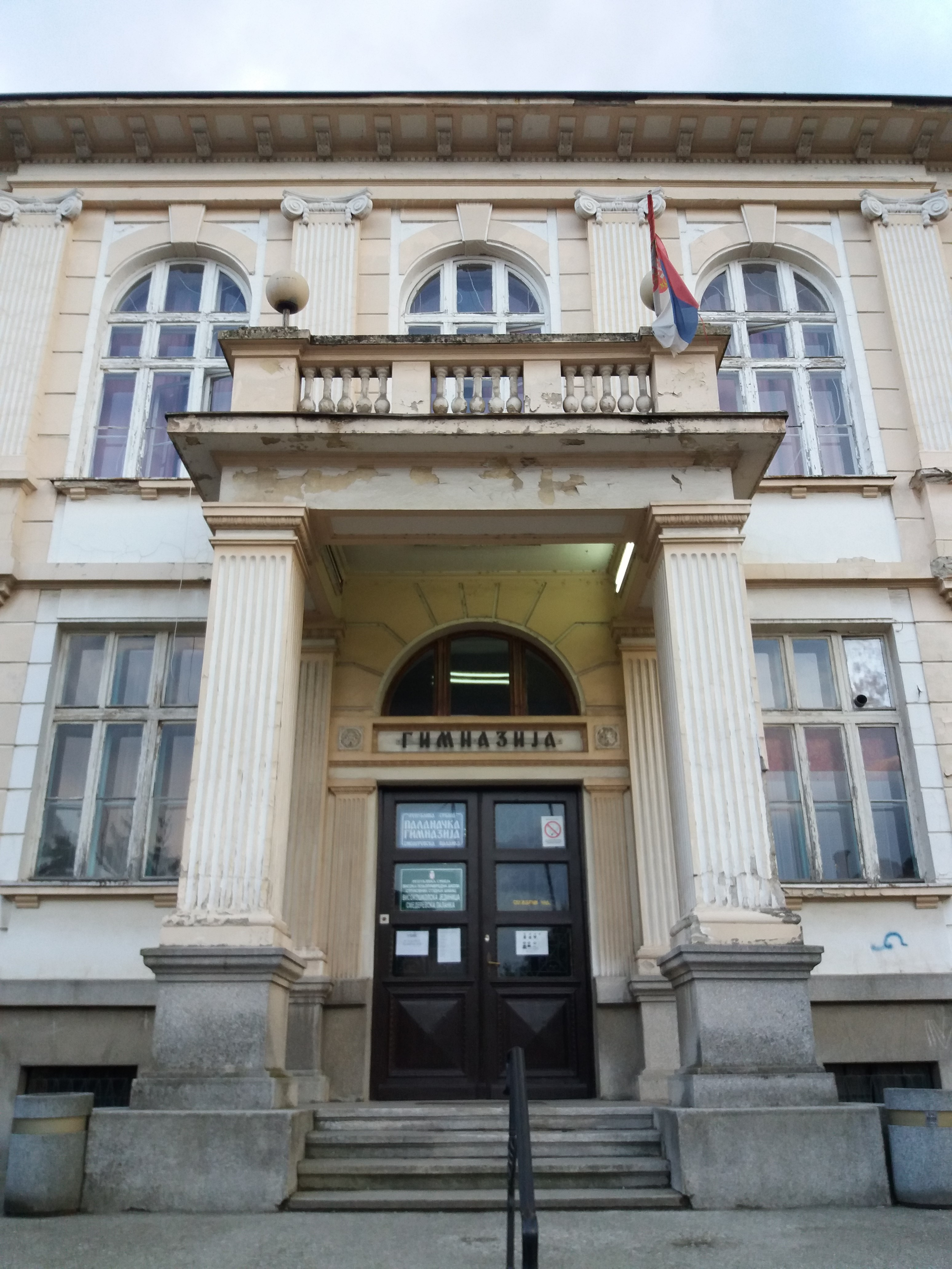 Srpski (latinica): Gimnazija, Smederevska Palanka